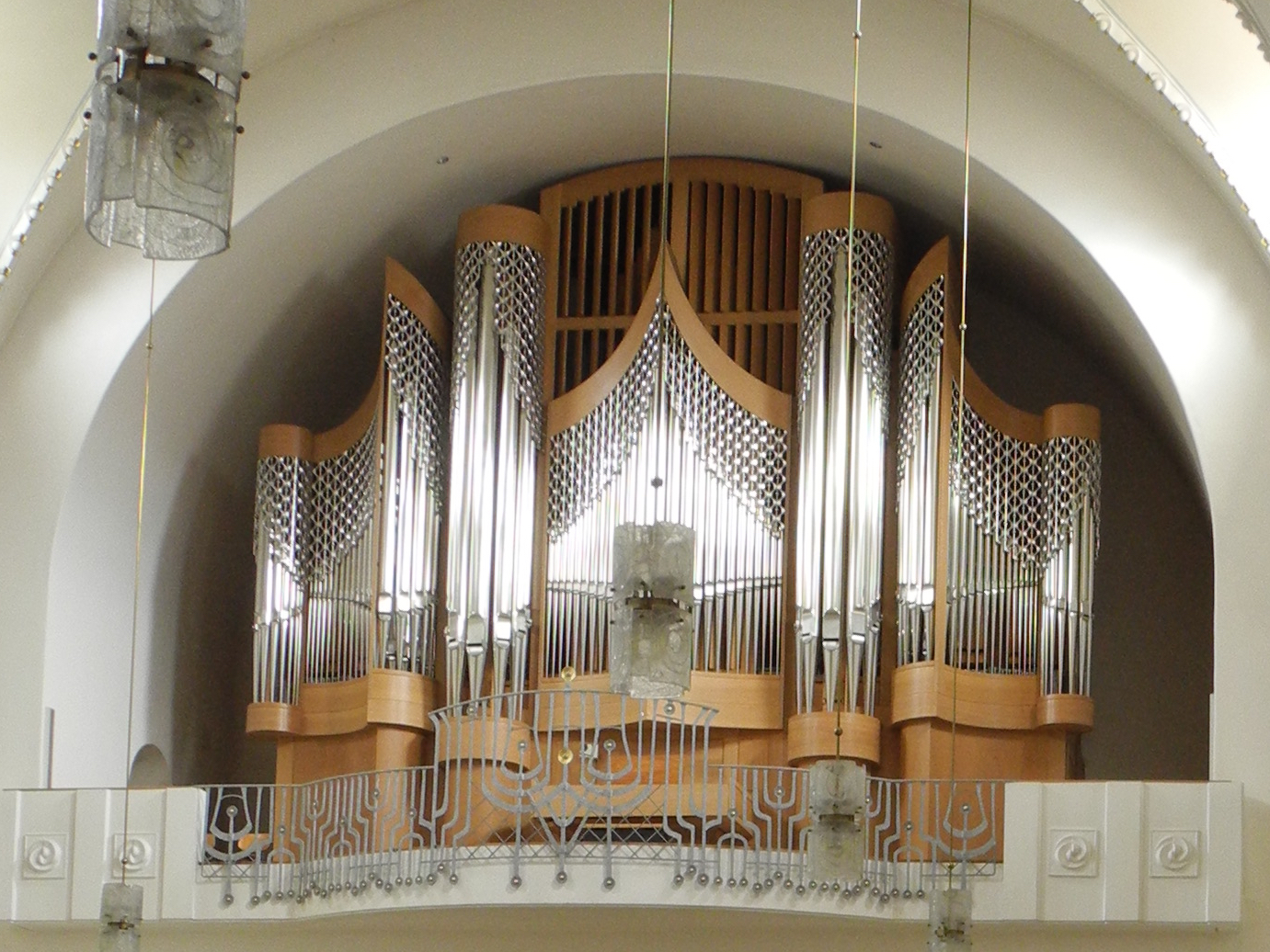 Abtei Schweiklberg, Dreifaltigkeitskirche, Hauptorgel, 2000 (Klais, 52-III-P)